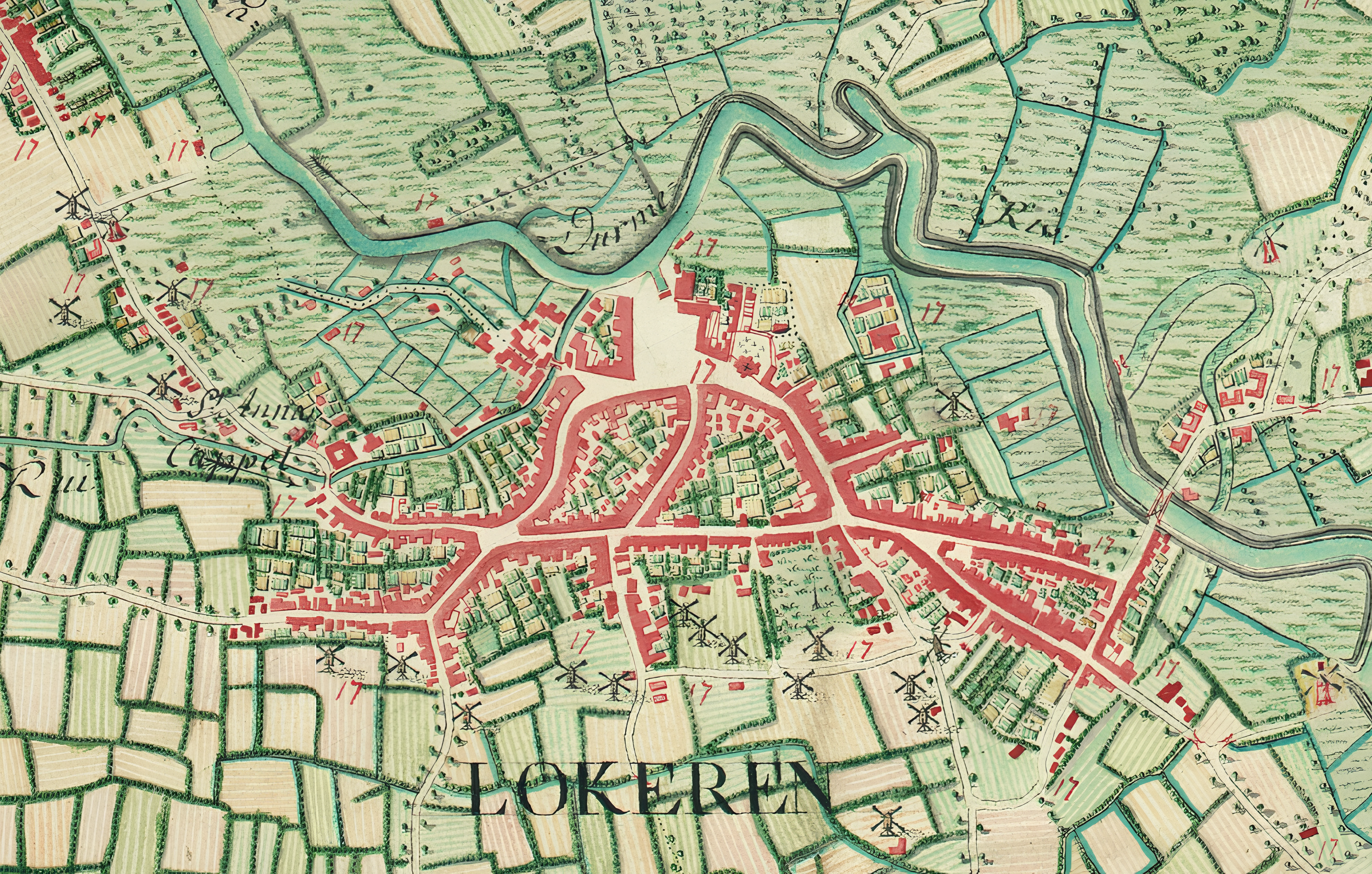 Lokeren tussen 1771-1778 op de atlas van Ferraris